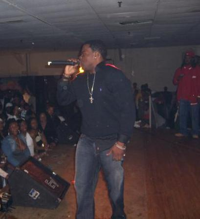 Bling Dawg, Berlin 2009